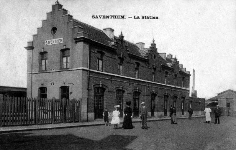 Le bâtiment voyageurs vu de la place vers 1900.